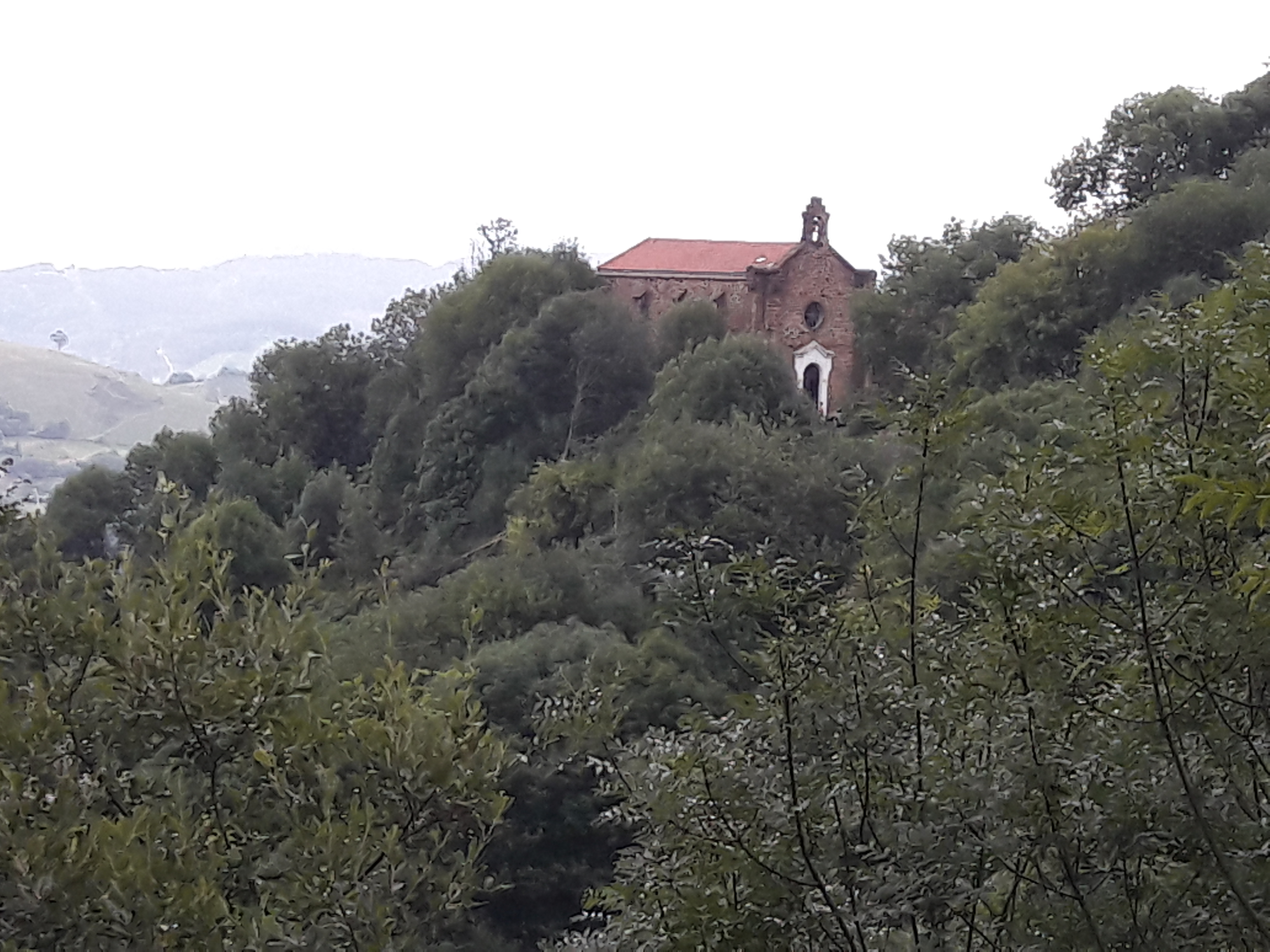 Bilboko San Roke baseliza